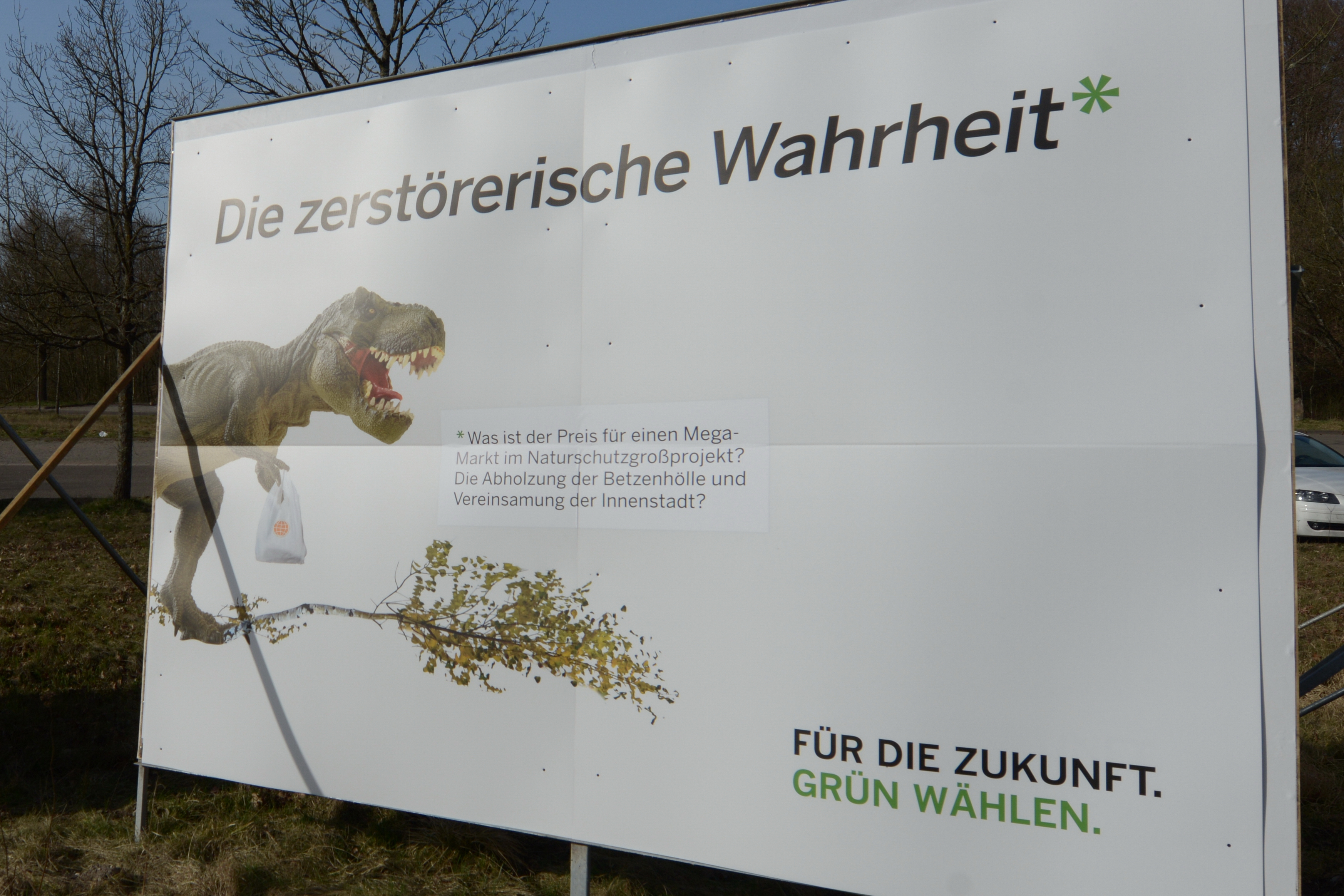 Wahlplakat zur Landtagswahl 2017 im Saarland von Bündnis 90/ Die Grünen, Landesverband Saarland, zum Thema Ansiedlung eines SB-Warenhauses durch die Globus Holding im Kerngebiet der Landschaft der Industriekultur Nord (LIK.Nord). Das Plakat stand an dem Mitfahrerparkplatz Betzenhölle, wo das SB-Warenhaus errichtet werden sollte.